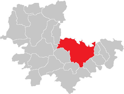 Bezirk Tulln